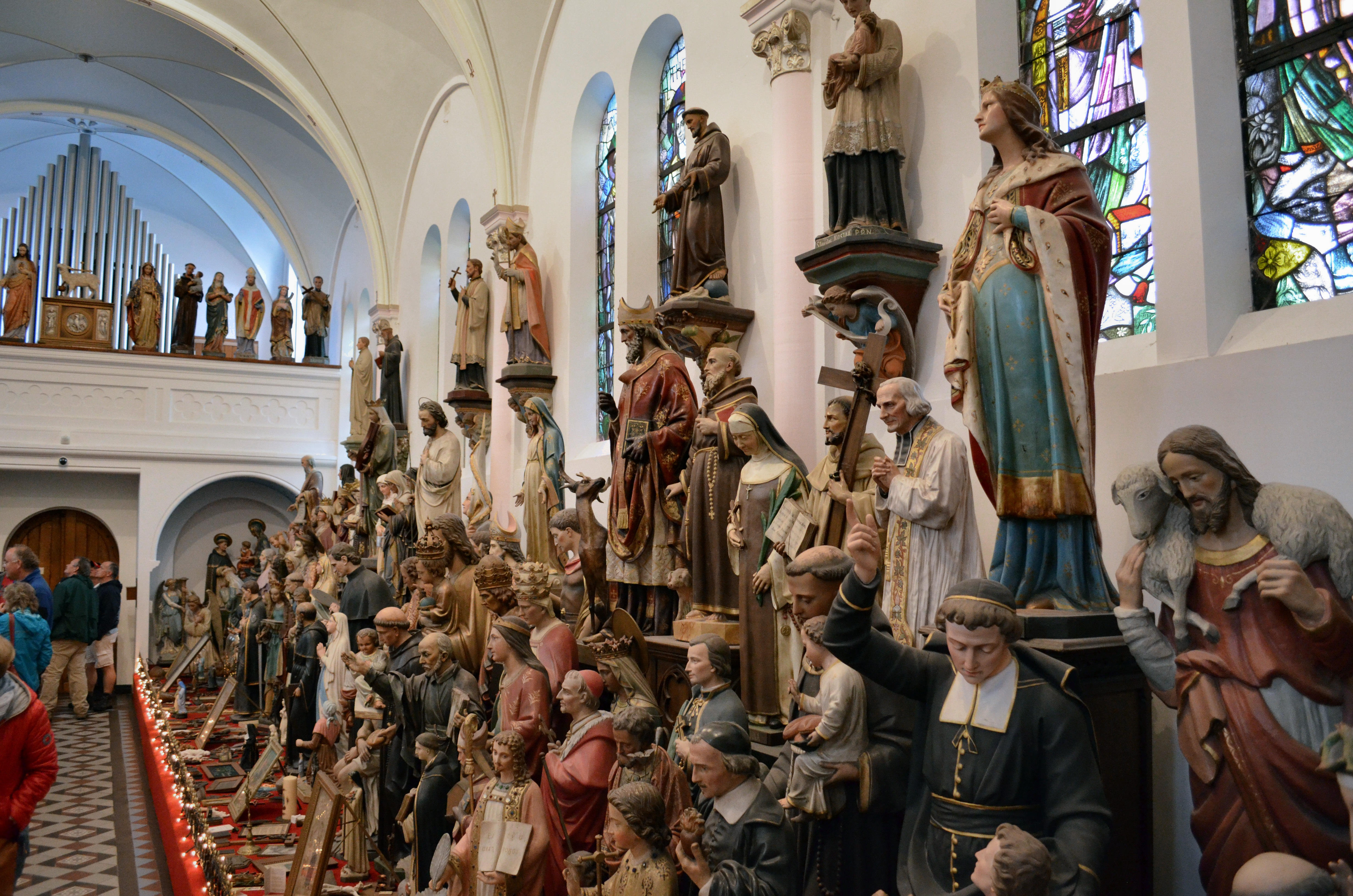 Haus De Esch in Vaals, Statuensammlung in der ehemaligen Klosterkapelle